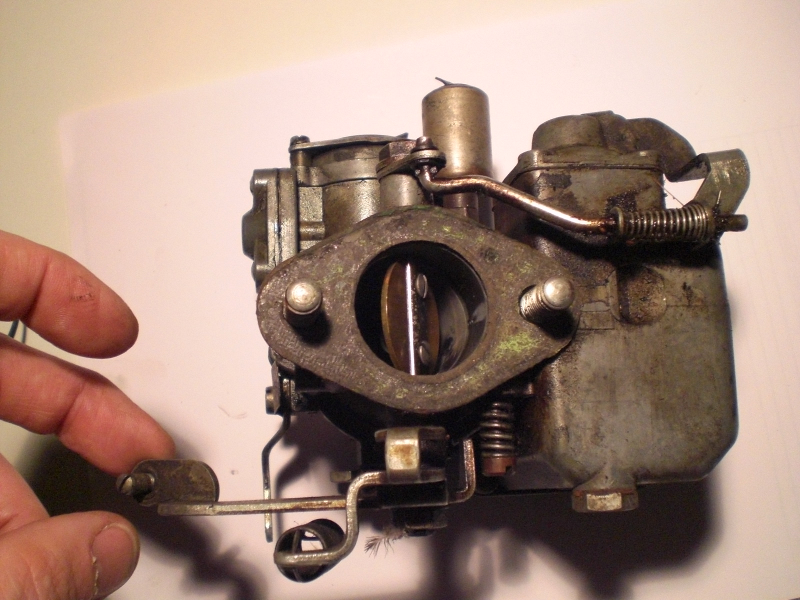 Vergaser_mit_Drosselklappe